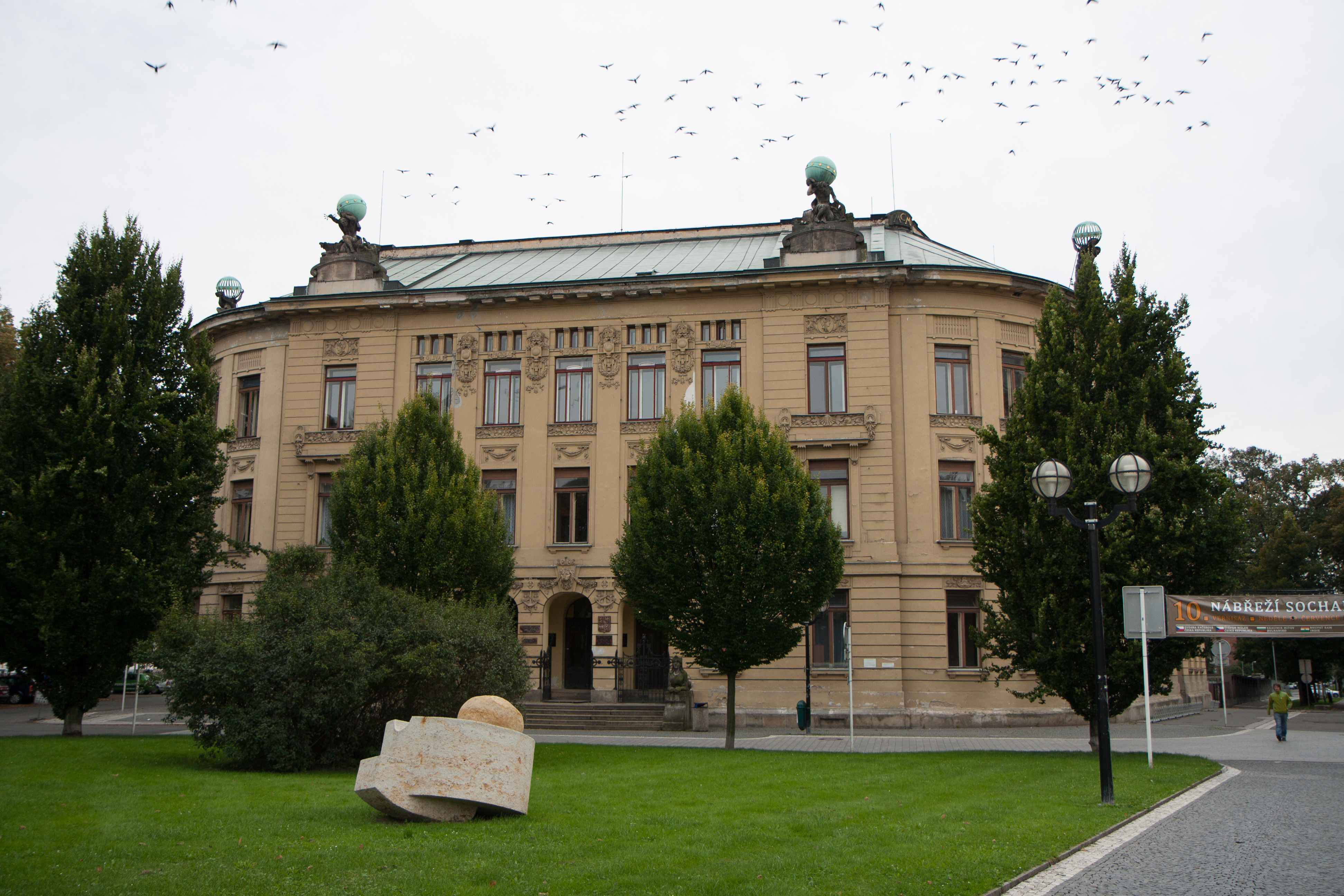 Pedagogická fakulta - Univerzita Hradec Králové